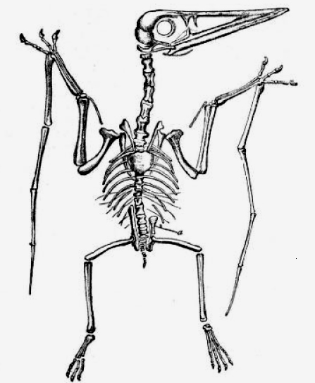 Pterodactylus aus Lydekker R., 1888, Catalogue of the fossil Reptilia and Amphibia in the British Museum (Natural History). Part I. London, pp. 2–42 gemeinfrei